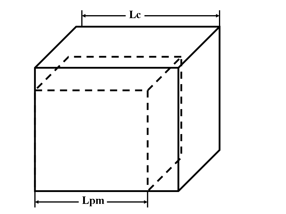 Contracción de una parte de plástico inyectada